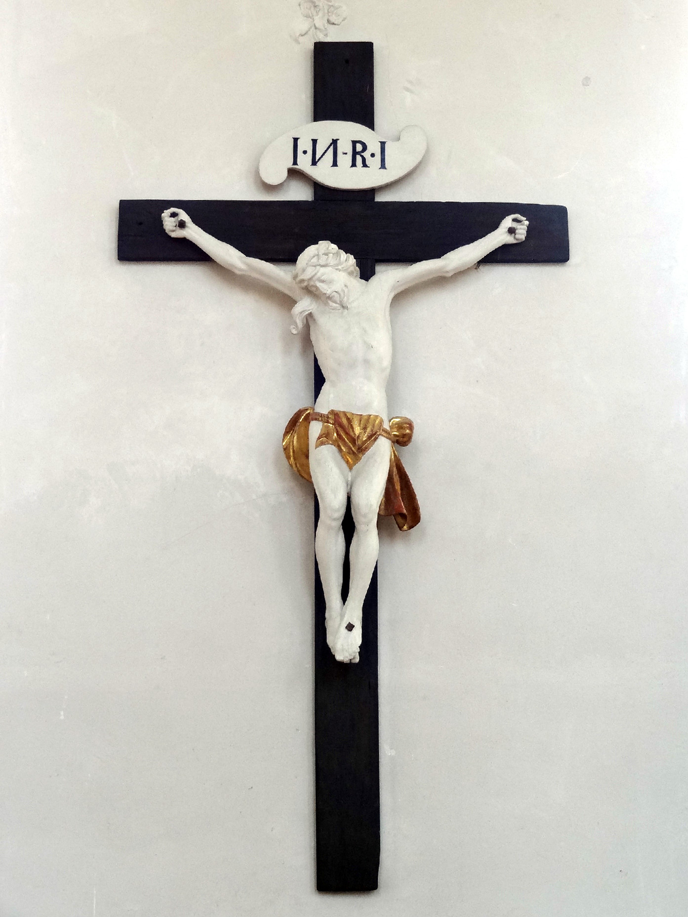 Klosterkirche (JVA Rockenberg)